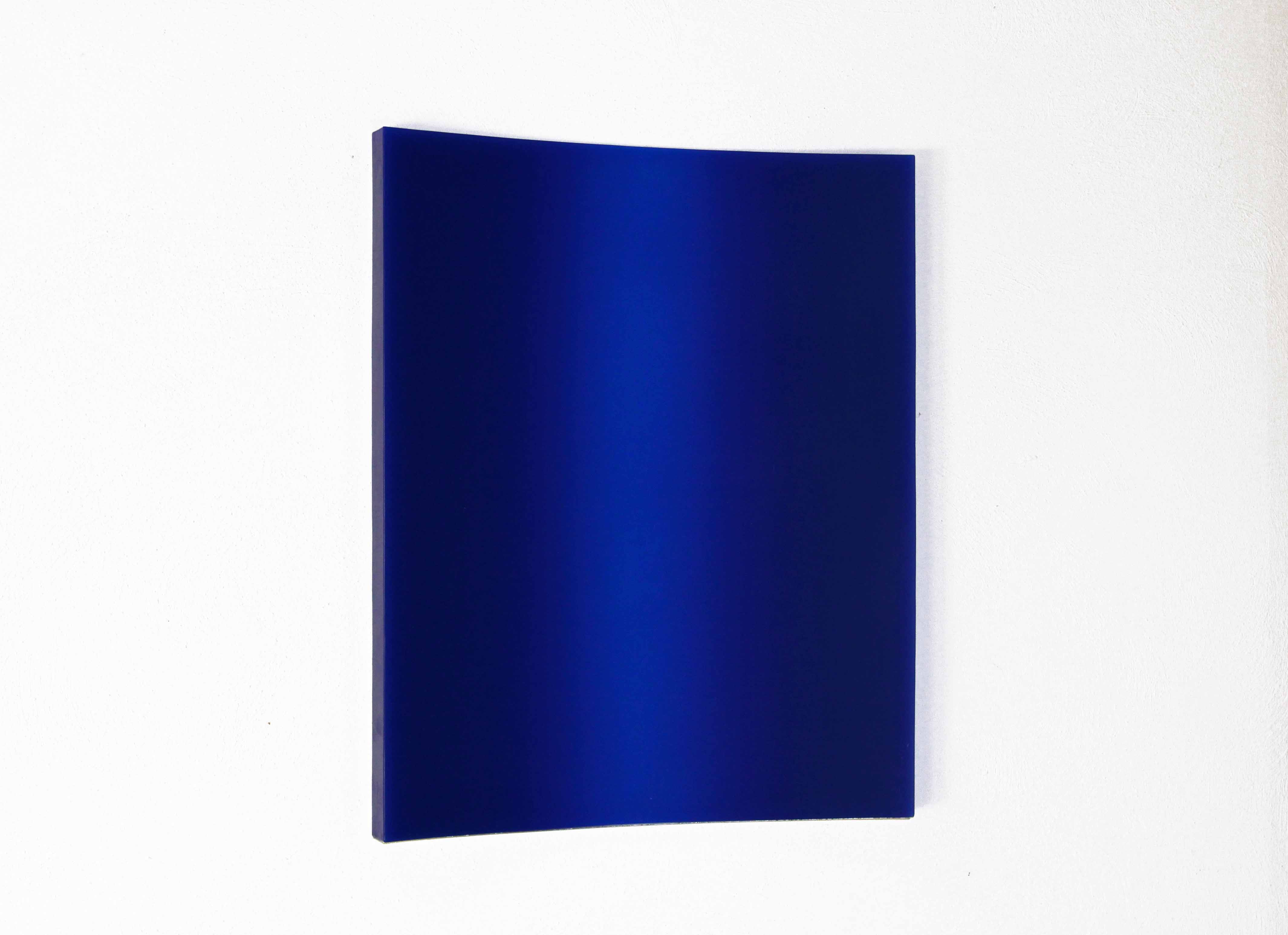 Norbert Müller-Everling, o.T., 2007, Paraffin u. Wachspigmente, 80 x 66 x5 cm